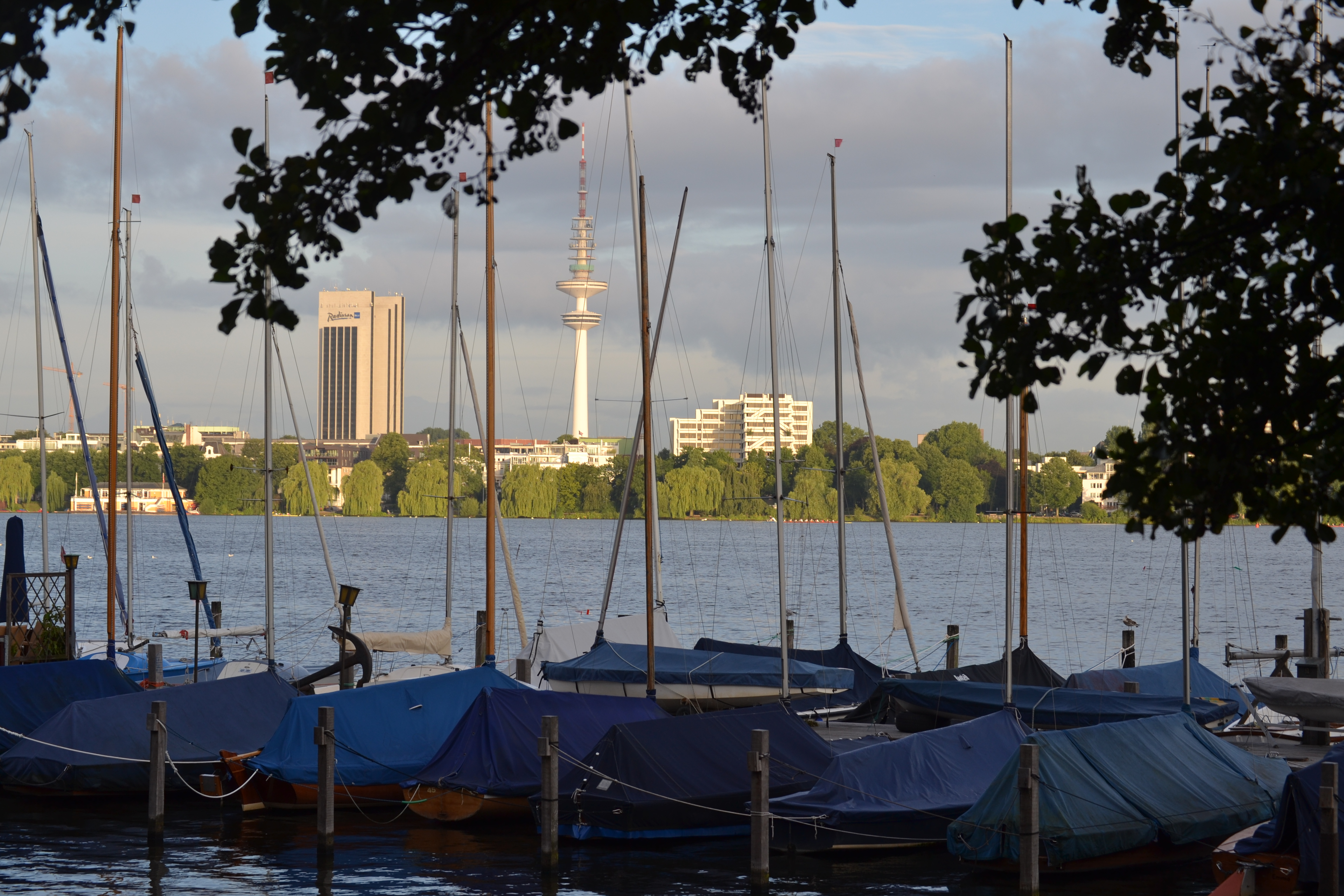 Hamburg: Heinrich-Hertz-Turm ("Telemichel") mit Radisson Blu-Hotel und Außenalster